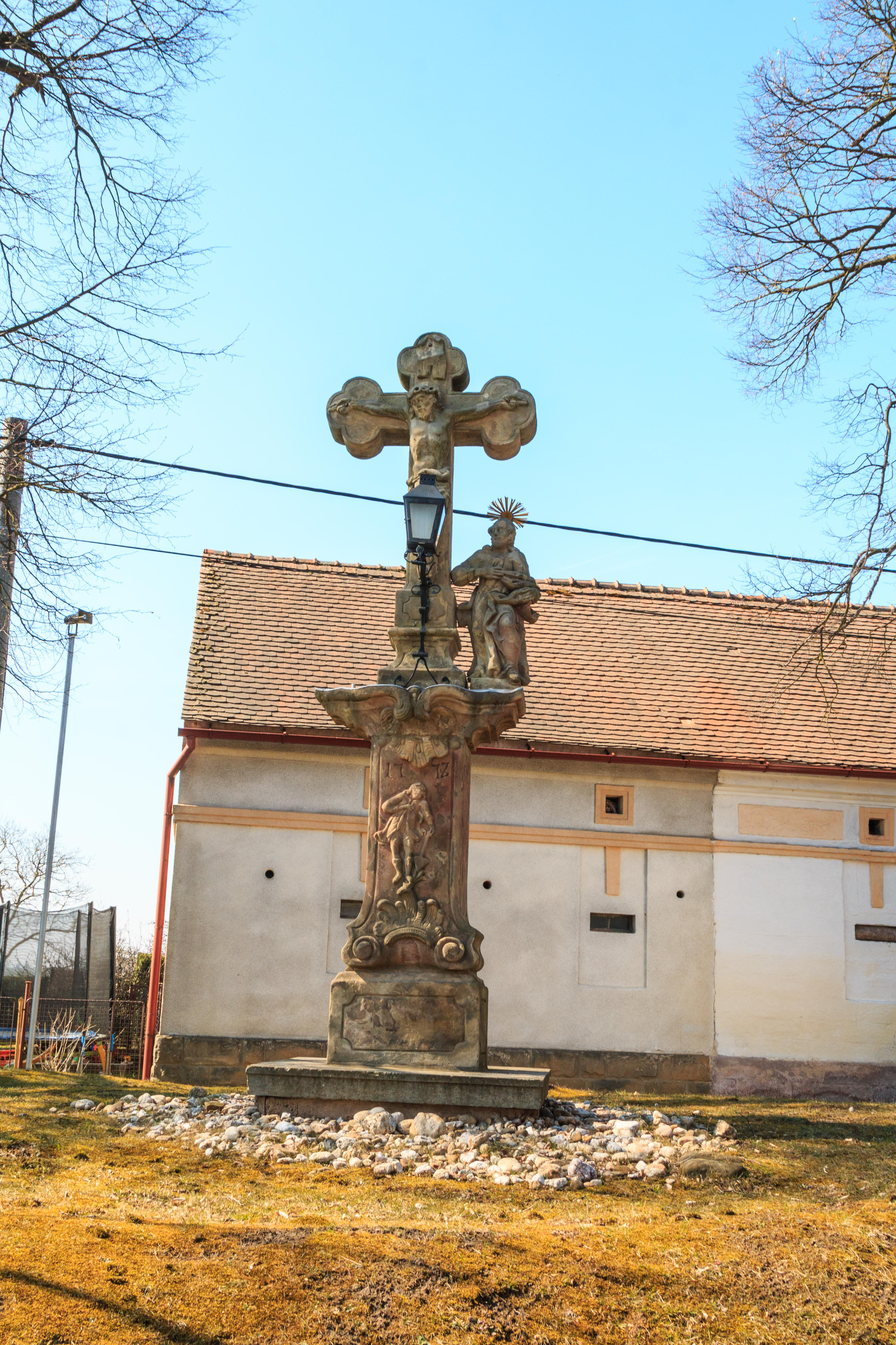 Sloup se sousoším Kalvárie, ve středu obce, naproti čp. 15, Zelenecká Lhota.